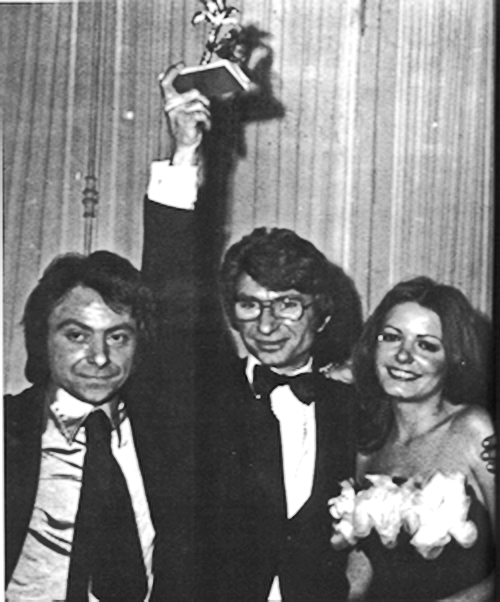 I primi tre cantanti classificati al Festival di Sanremo 1972